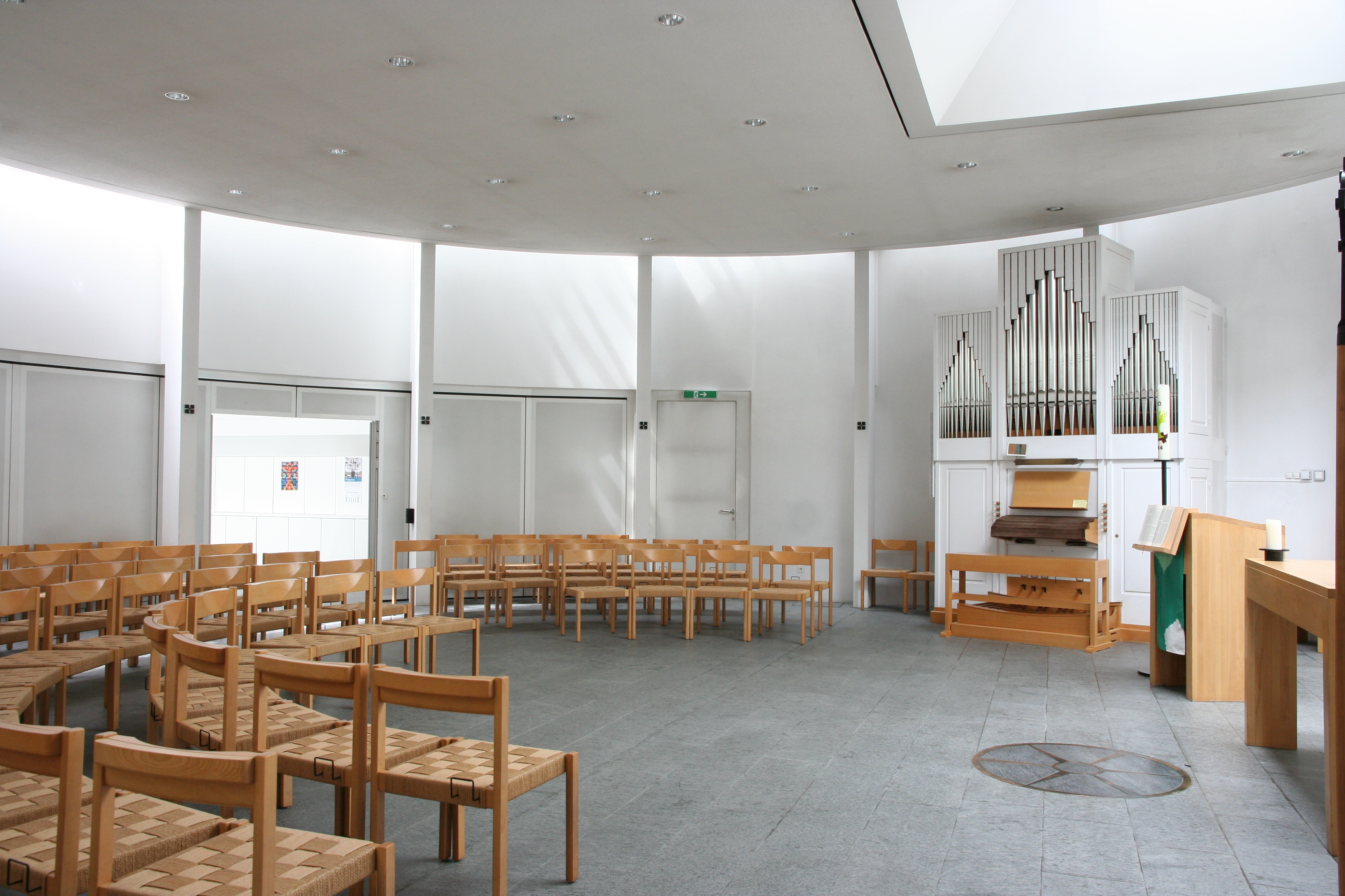 Römisch-katholische Kirche Heilig Chrüz Oberrieden ZH, Innenansicht